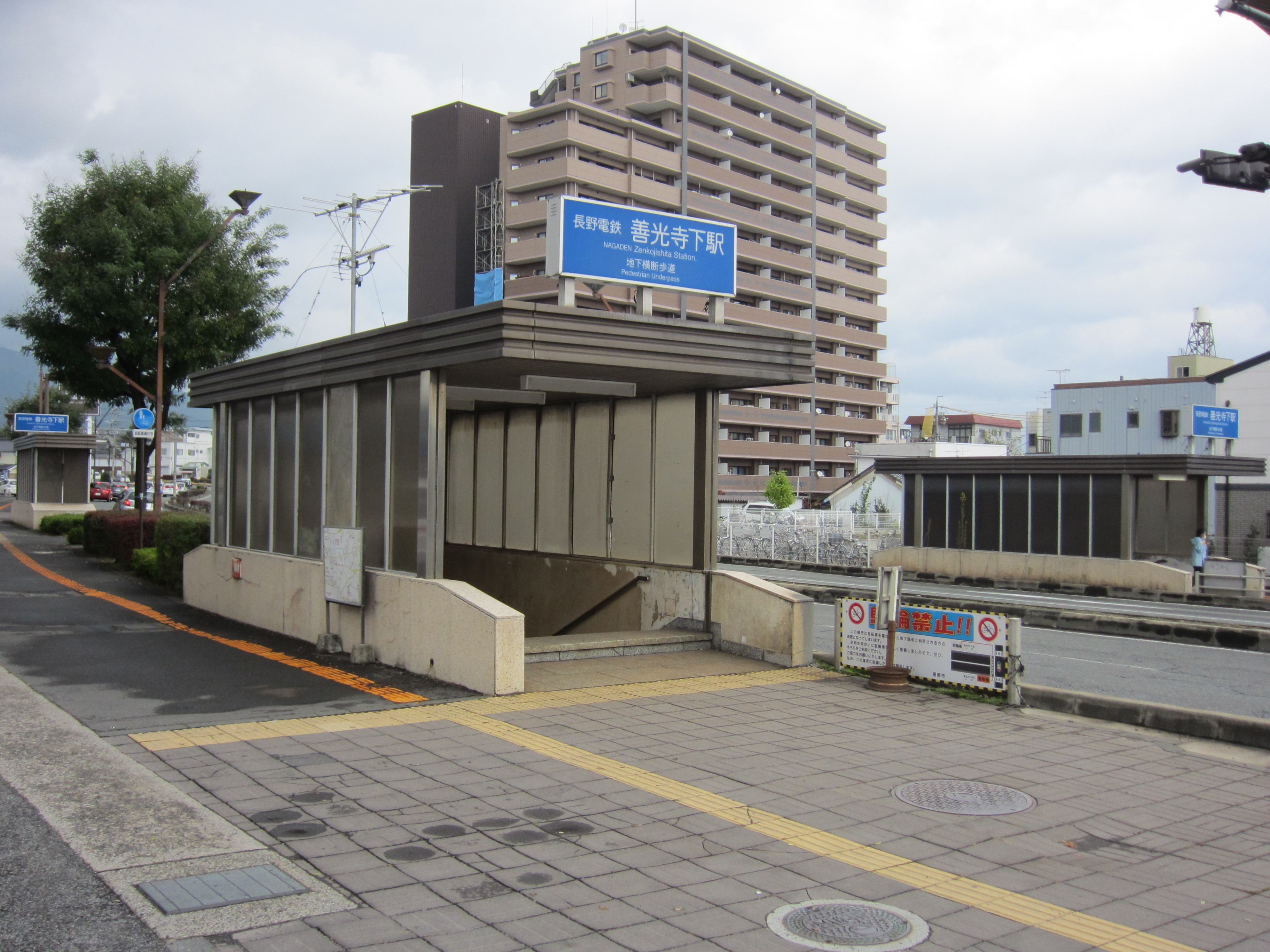 長野電鉄、善光寺下駅地上入口